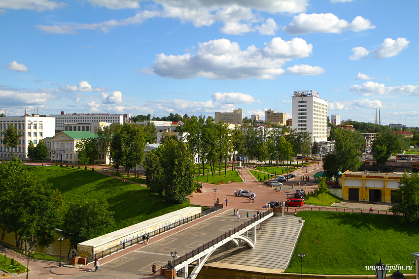 Віцебск. Вуліца Пушкіна